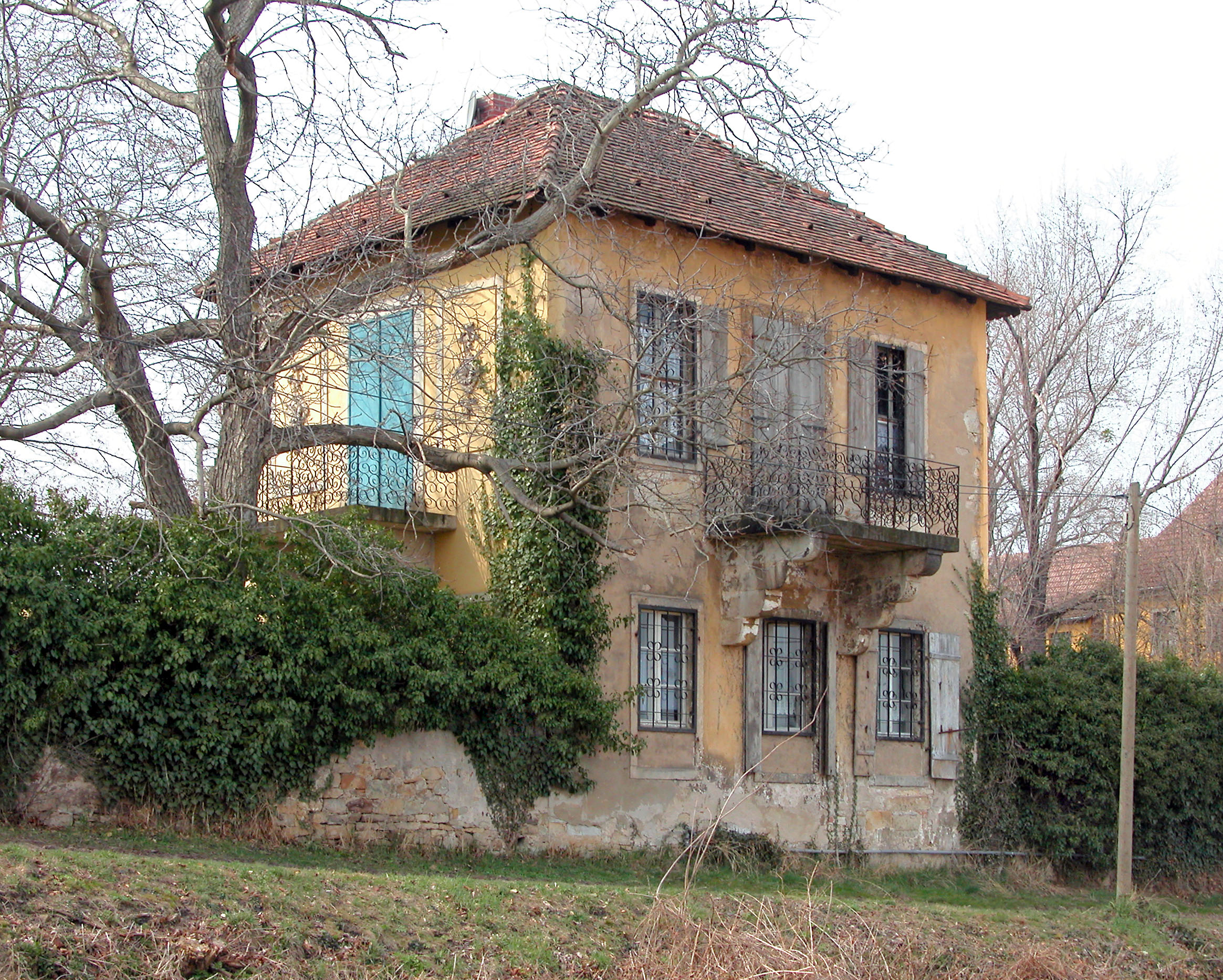 02.04.2004 01809 Borthen (Dohna), Kleinborthener Straße: Auf einem Bergsporn südlich von Dresden liegt das Rittergut Borthen mit einem alten und einem neuen Schloß. In die Mauer, die den Schloßgarten nach Nordosten begrenzt, ist ein Lusthaus (GMP: 50.972325,13.795736 ) eingefügt, vermutlich aus der Mitte des 19. Jahrhunderts, heute bewohnt. Sicht von Nordosten. [DSCN2674.TIF]20040402820DR.JPG(c)Blobelt